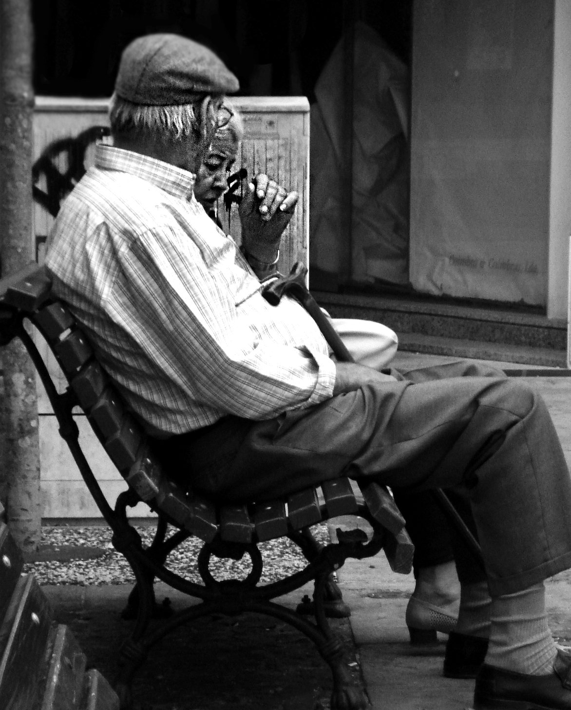 Coimbra | Portugal 2013